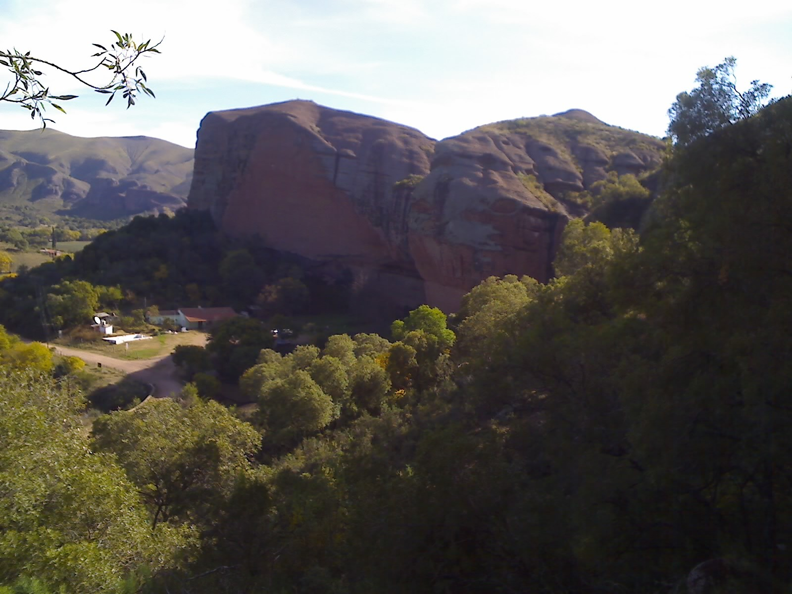 Cuevas de Ongamira, Provincia de Córdoba